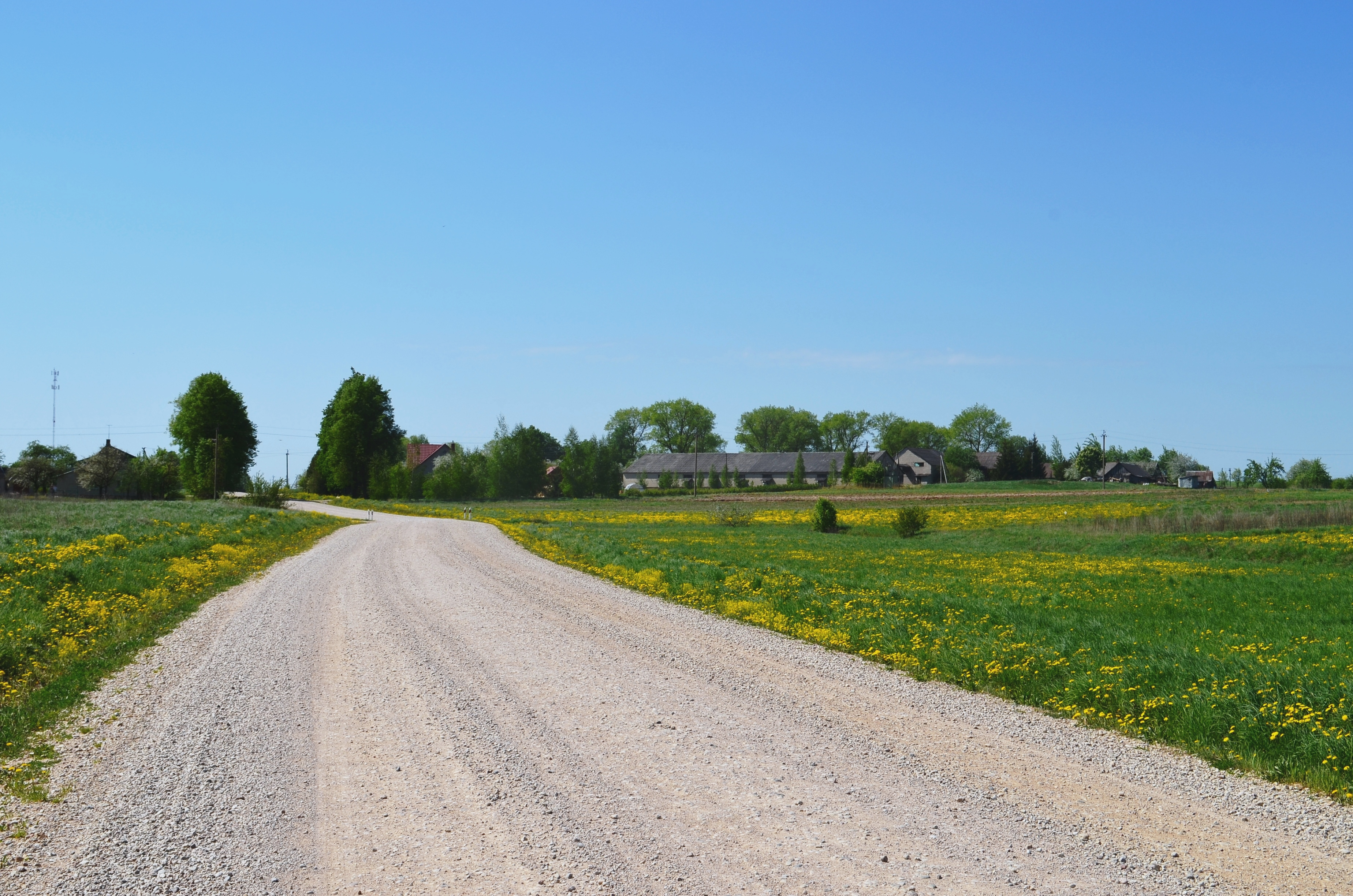 Pumpučiai, Kavarsko sen., Anykščių raj.